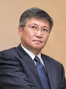 Санжийн Баяр